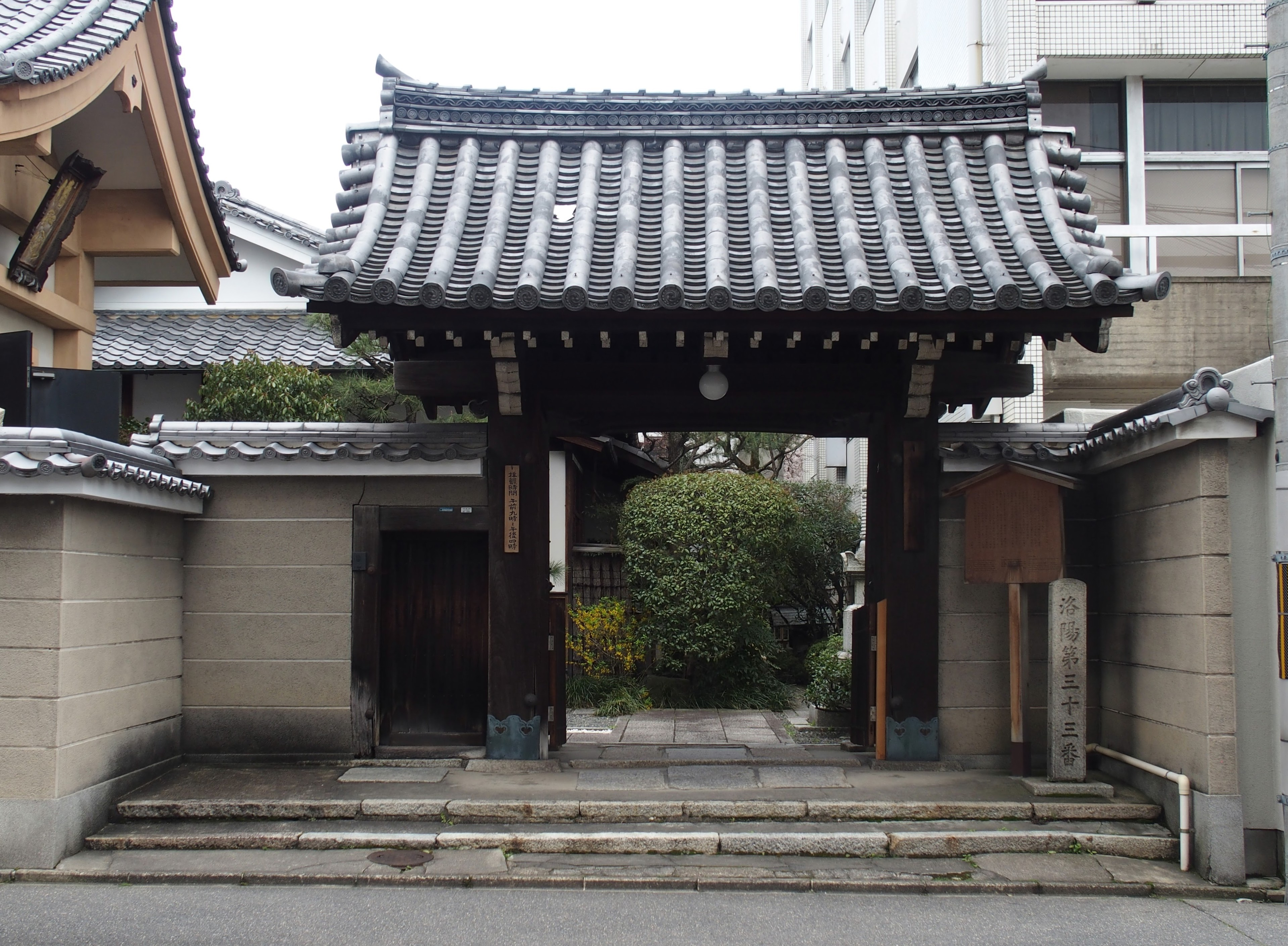 清和院山門